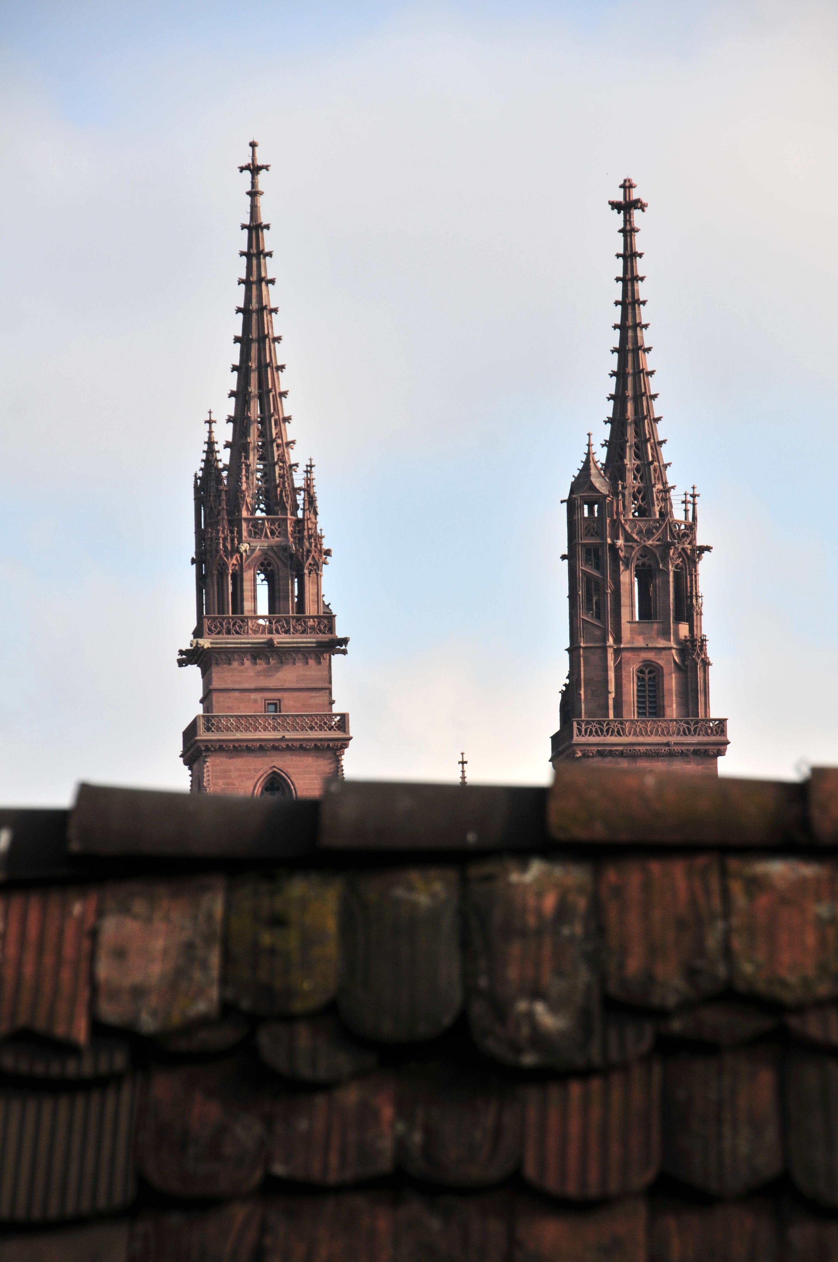 Basel